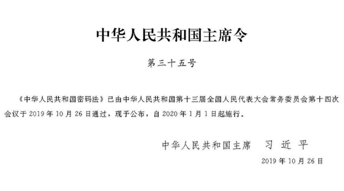 中文（中国大陆）: 中华人民共和国全国人民代表大会常务委员会公报2019年第六号 第9页 中华人民共和国主席令